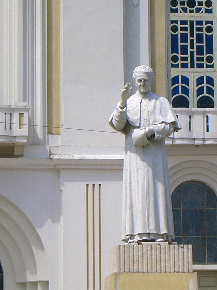 Estatua Don Juan Bosco, Moca, Republica Dominicana